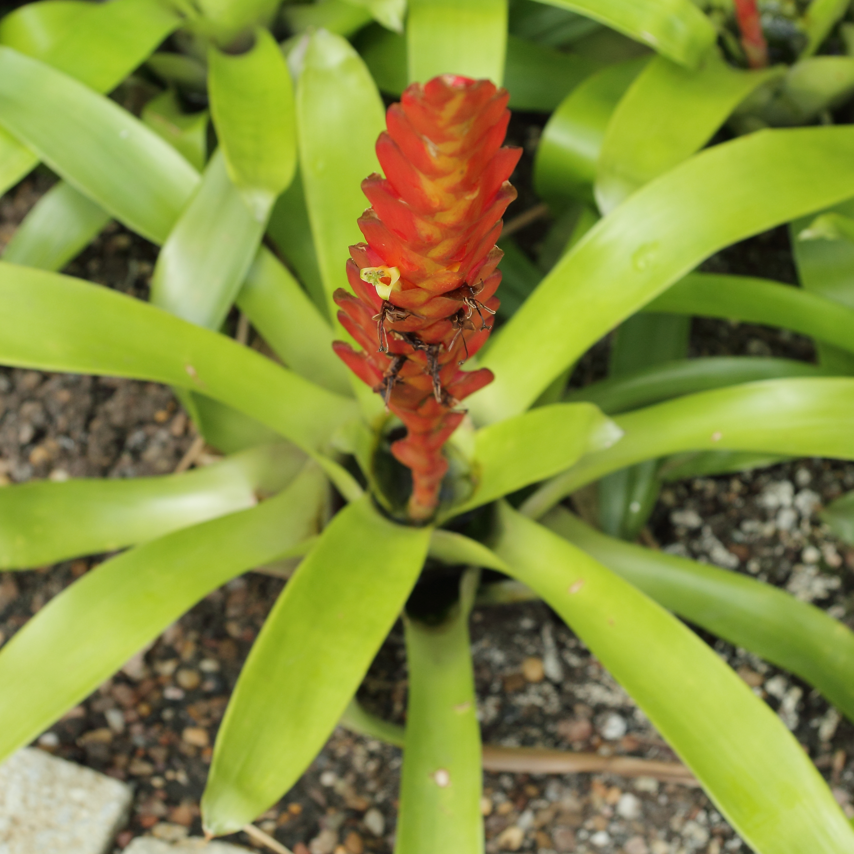 Vriesea duvaliana, identifierad med hjälp av befintlig skylt vid Kew Gardens, London.